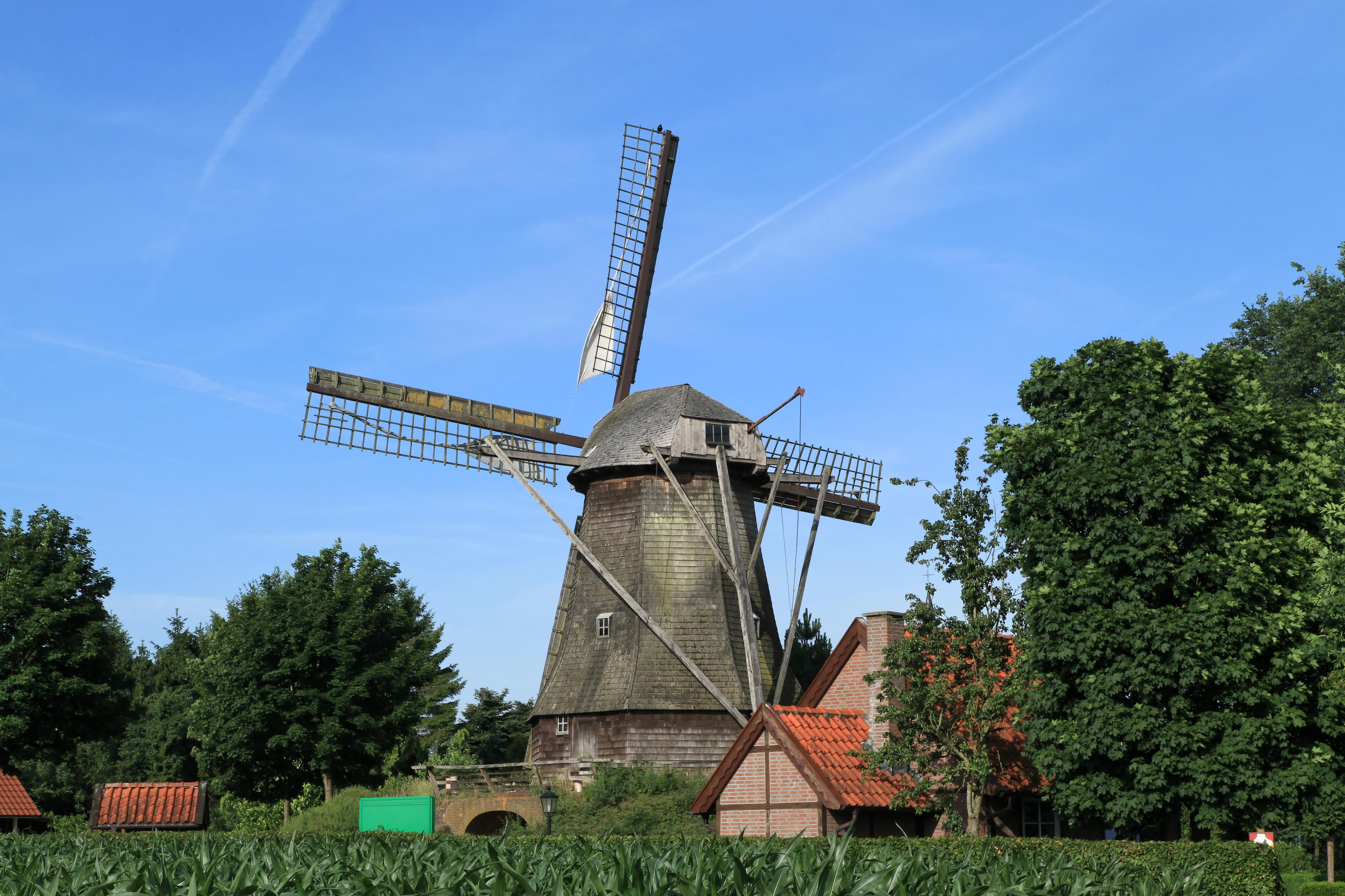 Windmühle hinter dem Möhlenpatt in Wippingen